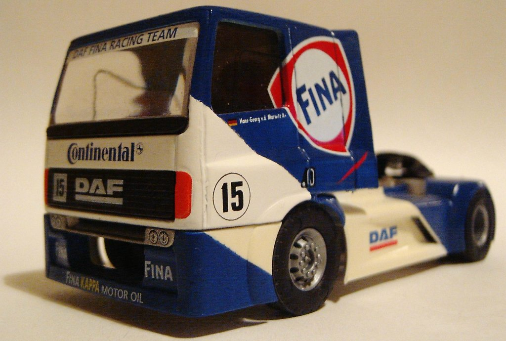 De Backer modelauto van de DAF SRT.